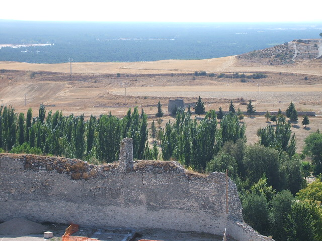 Paño de la muralla de la ciudadela en la explanada frente al castillo (Cuéllar)